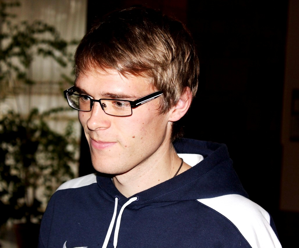 Вели Лампи